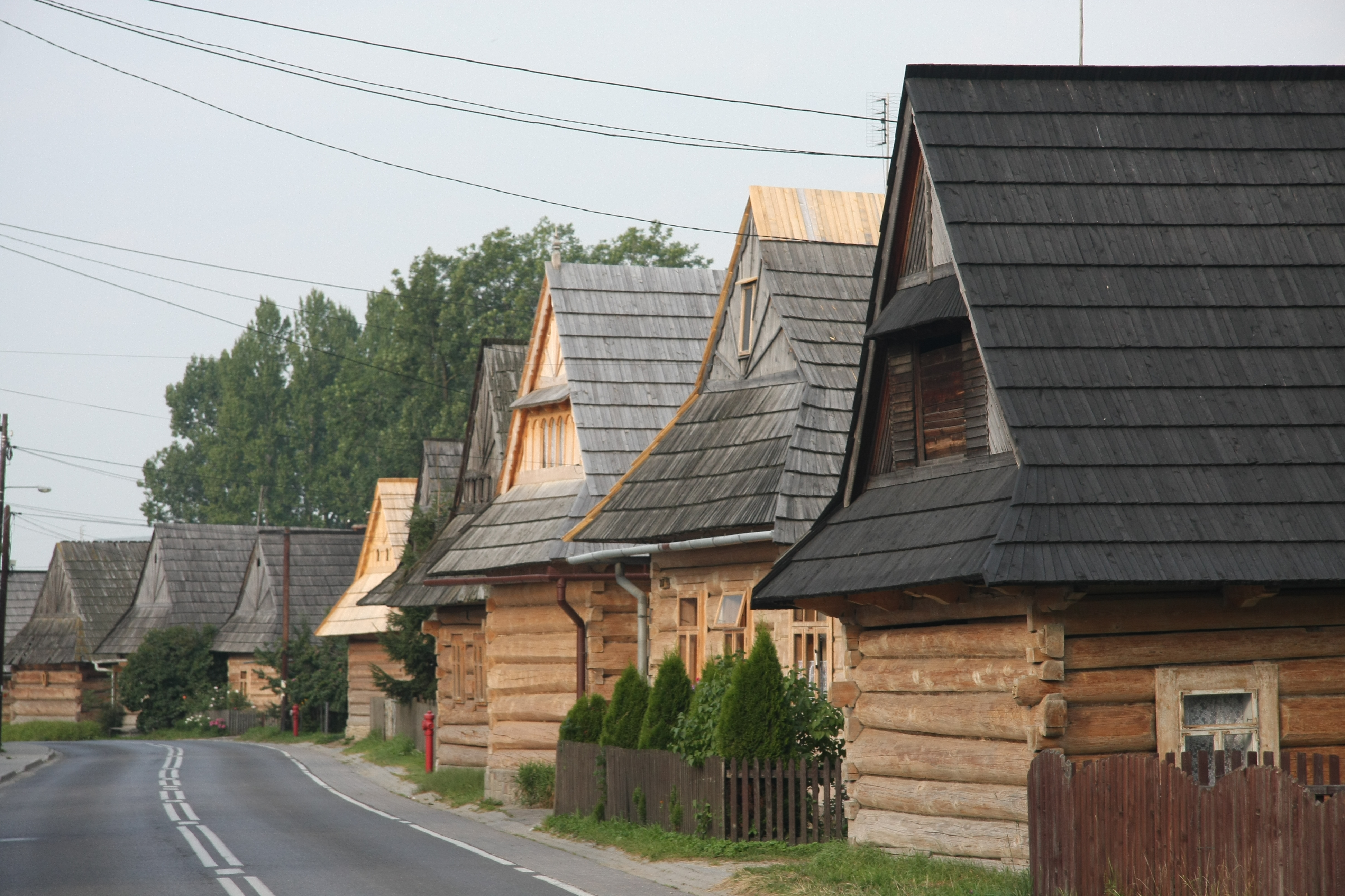 Zabudowa wzdłuż głównej ulicy w Chochołowie